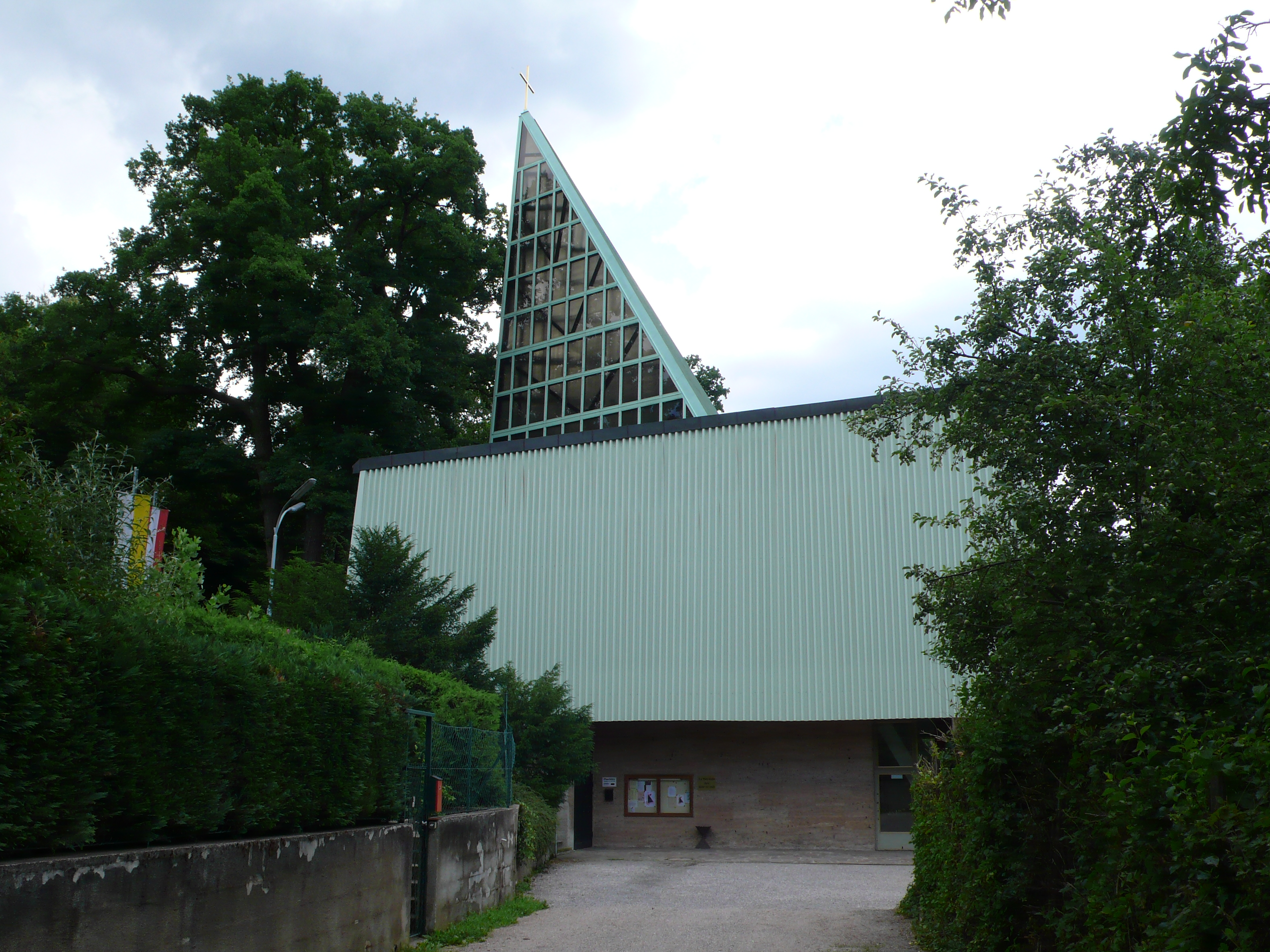 Kordonkirche, Penzing, Wien 14.